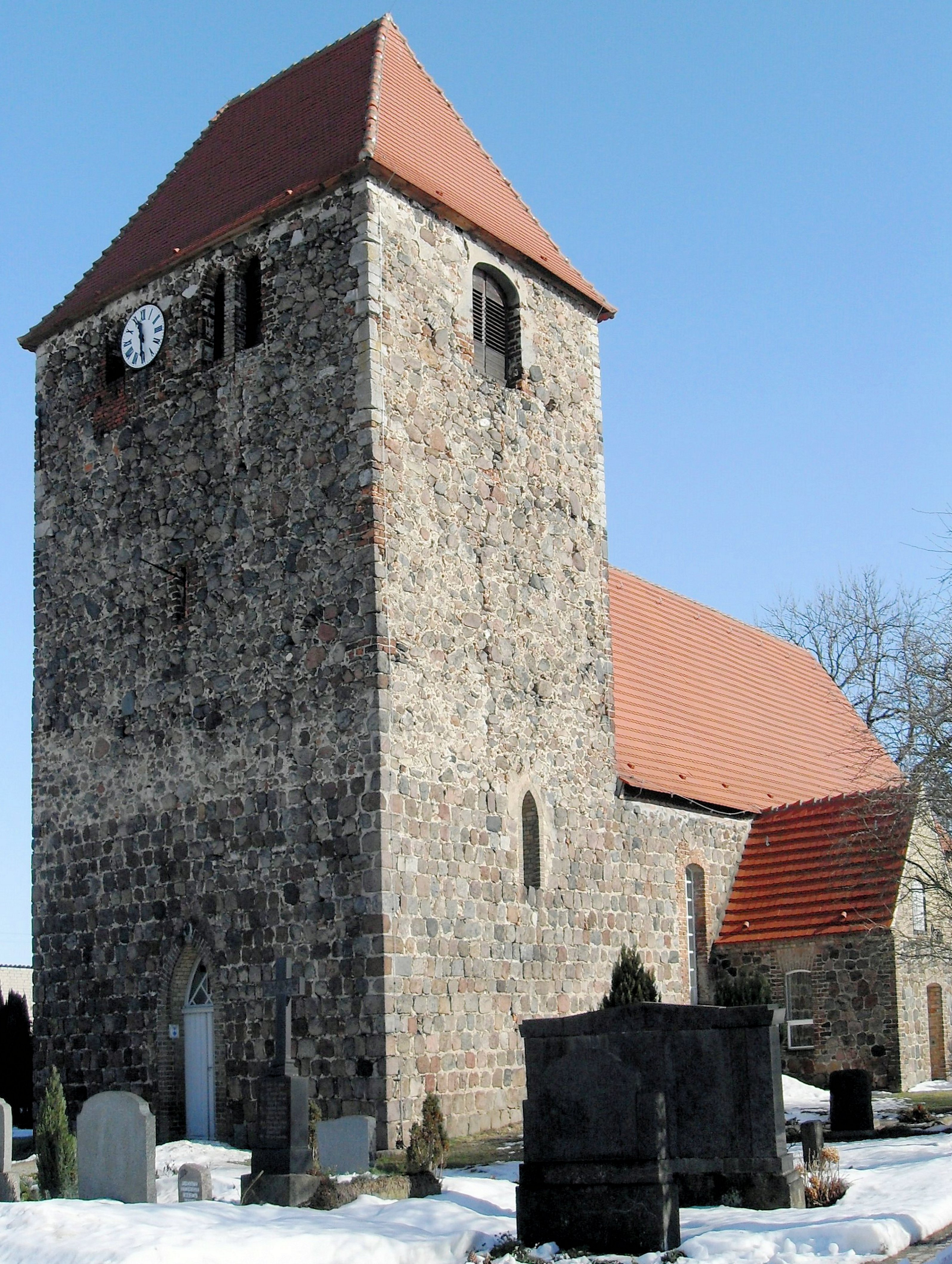 Kirche in Garzin, Gemeinde Garzau-Garzin, Deutschland